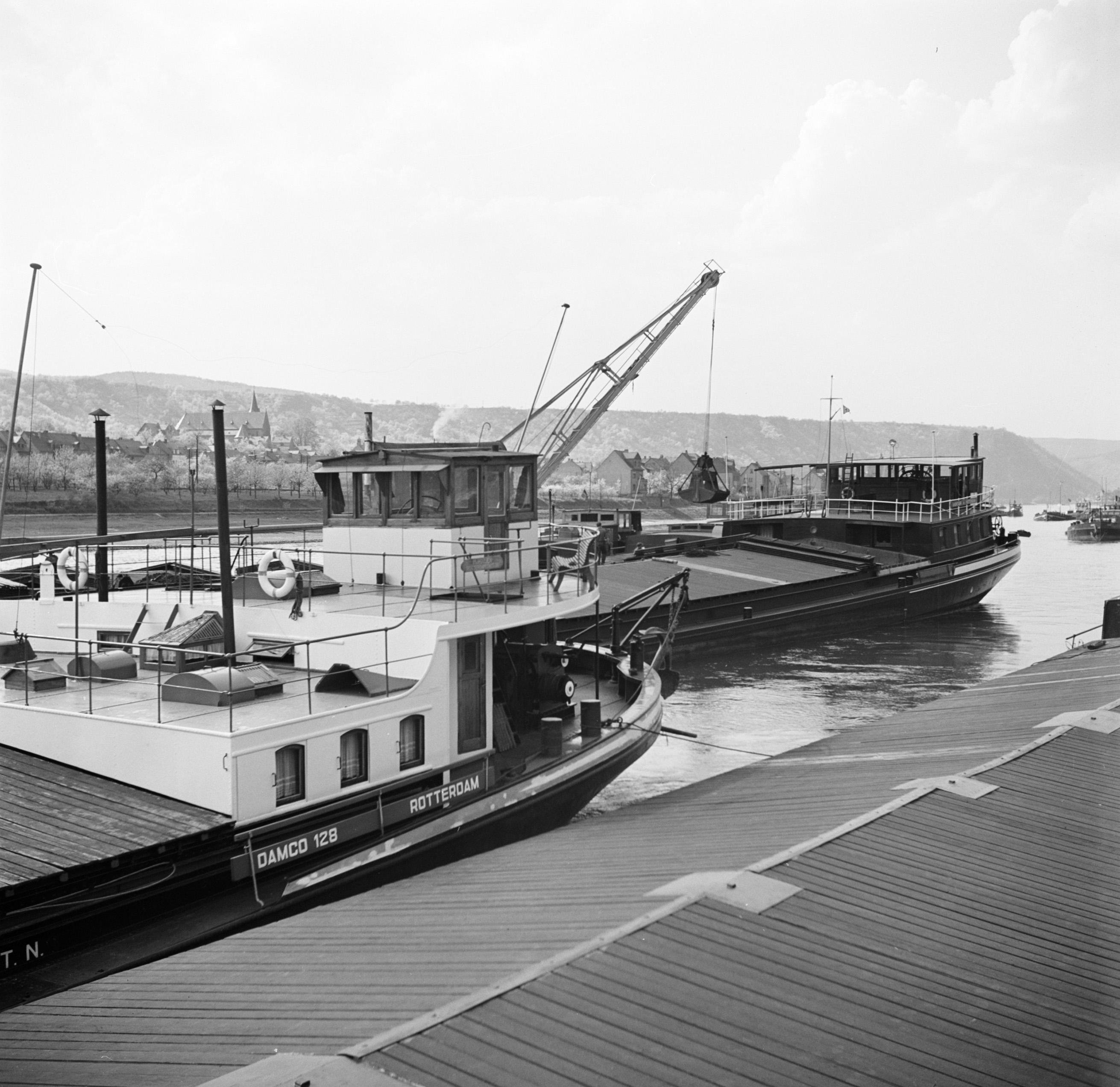 Collectie / Archief : Fotocollectie Van de Poll Reportage / Serie : Rijnvaart, reportage vanaf sleepboot Damco 9: West-Duitsland Beschrijving : Voorbereidingen voor de doorvaart Bad Salzig - Bingen i.v.m. bochten, stroomversnellingen en lage waterstand. Overslag van lading ter hoogte van Bad Salzig, vooraan de Damco 128 Datum : 1 april 1955 Locatie : Bad Salzig, Duitsland, West-Duitsland Trefwoorden : binnenvaartschepen, heuvels, hijskranen, laden en lossen, rivieren Fotograaf : Poll, Willem van de Auteursrechthebbende : Nationaal Archief Materiaalsoort : Negatief (6x6) Nummer archiefinventaris : bekijk toegang 2.24.14.02 Bestanddeelnummer : 254-1105